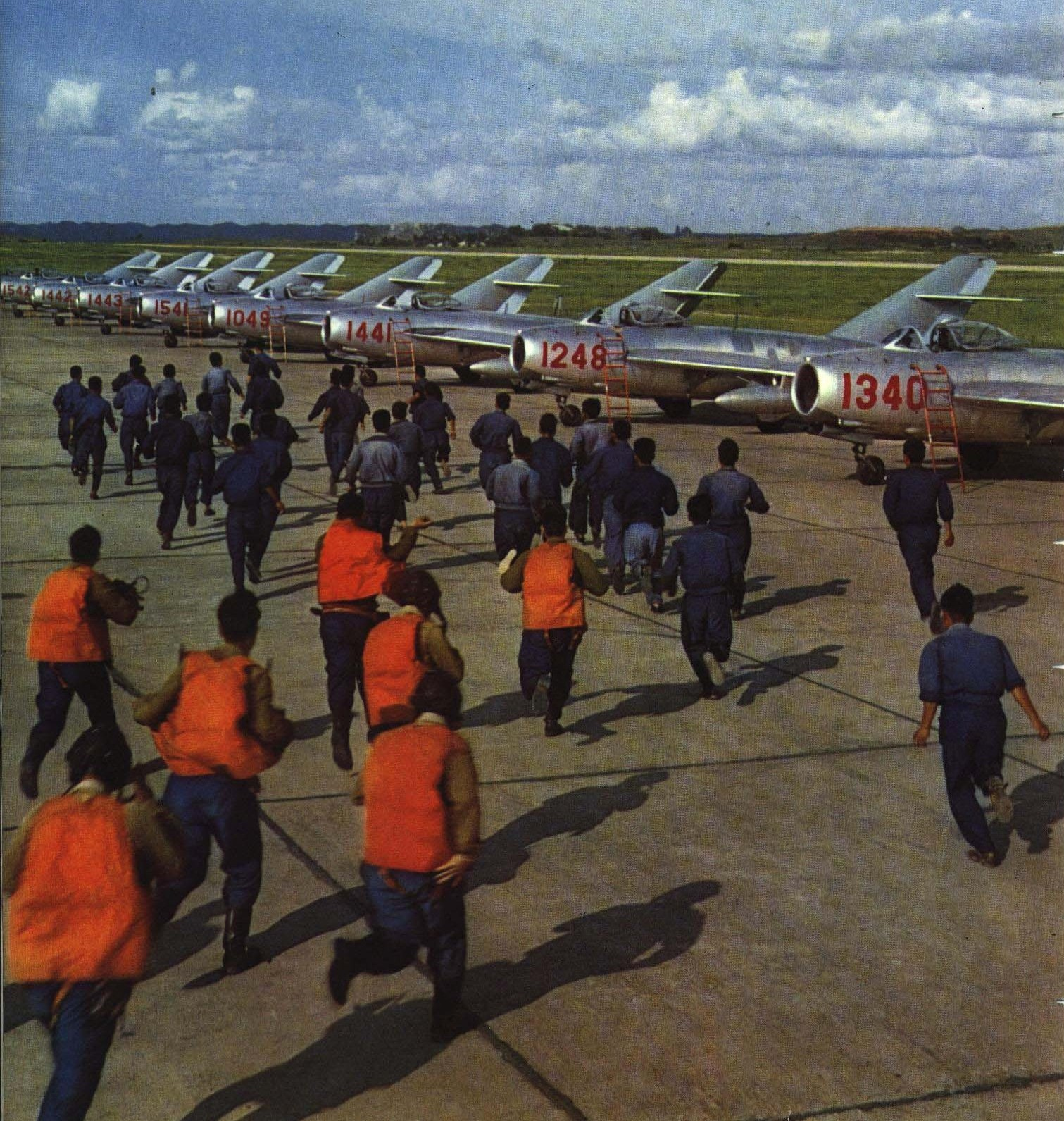 1965-11 1965 中国人民解放军航空兵